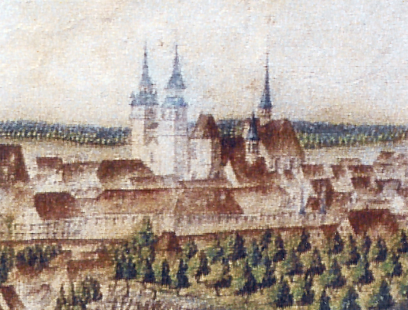 Heilig-Geist-Spital und Bartholomäuskirche in Grüningen 1797 (Ausschnitt). Die Dachreiter auf den Chören, das Langhaus der Spitalkirche und die Turmbrücke der Bartholomäuskirche sind noch vorhanden. Die Turmhelme der Bartholomäuskirche sind noch nicht gestutzt (vergrößerter Ausschnitt).